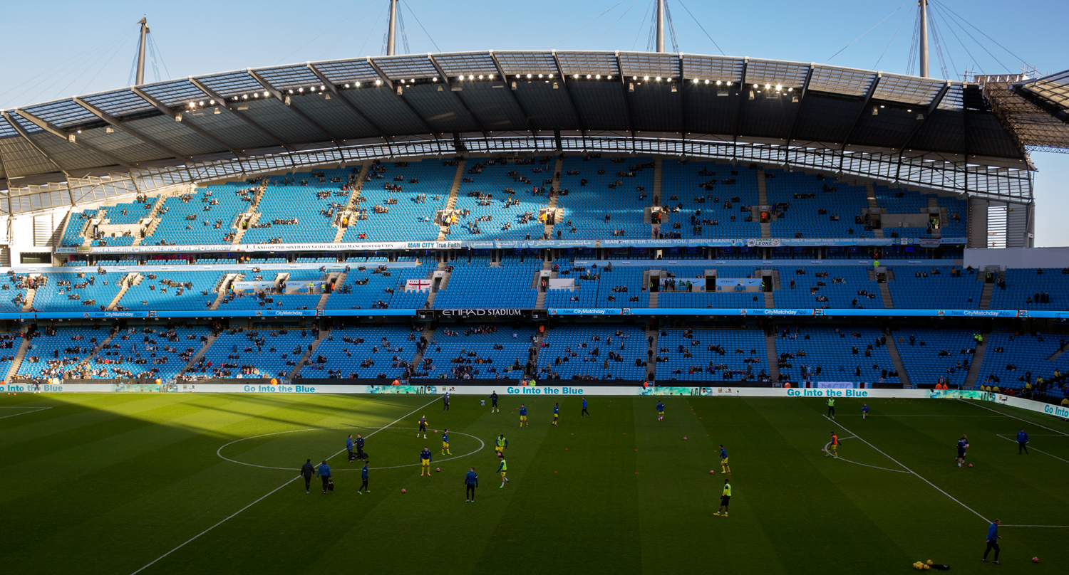 Etihad Stadium